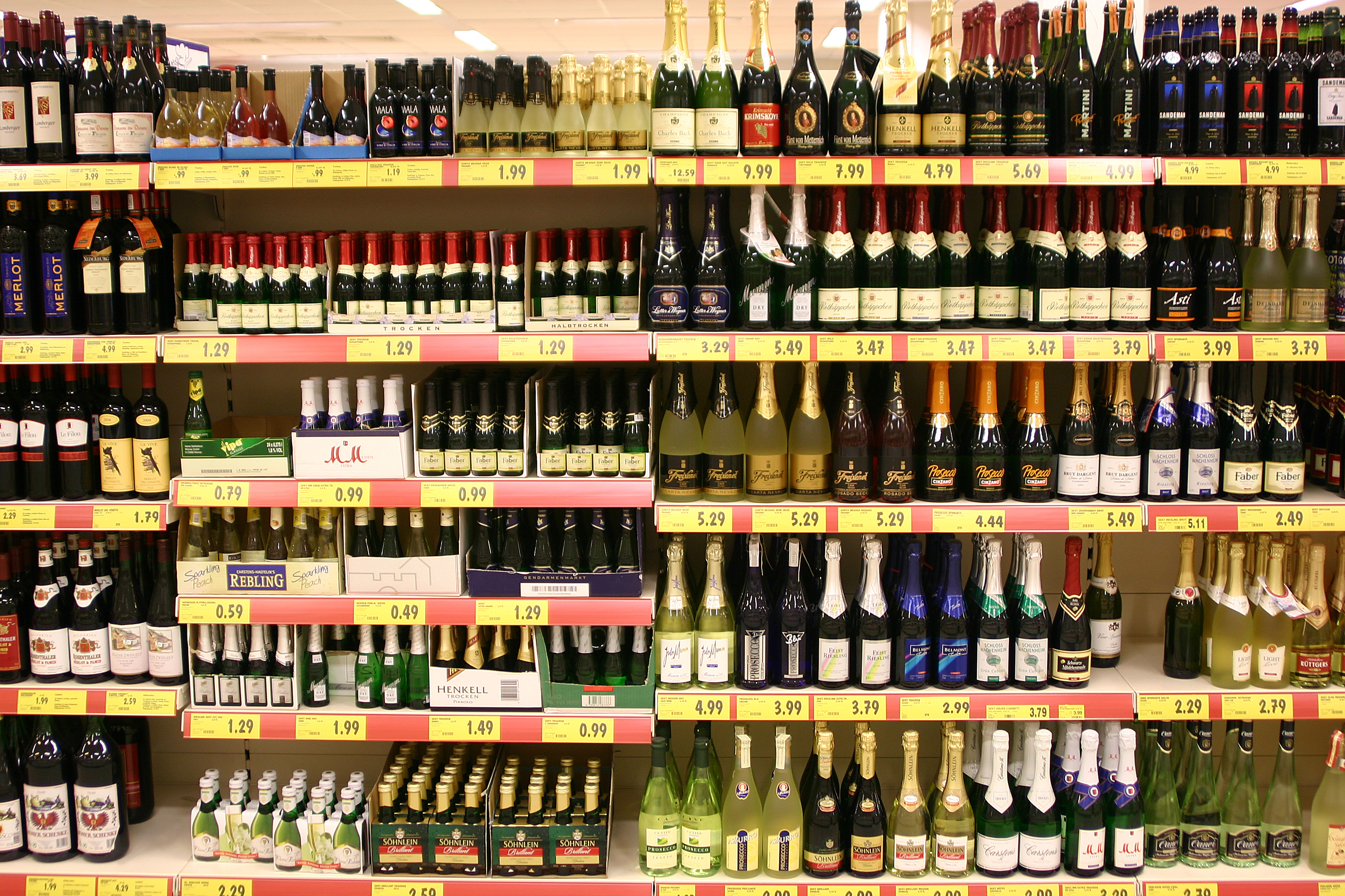 Bilder im Supermarkt REWE